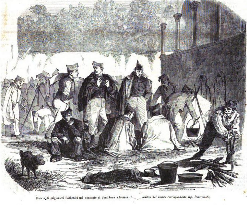 disegno rancio prigionieri borbonici vicino Isernia